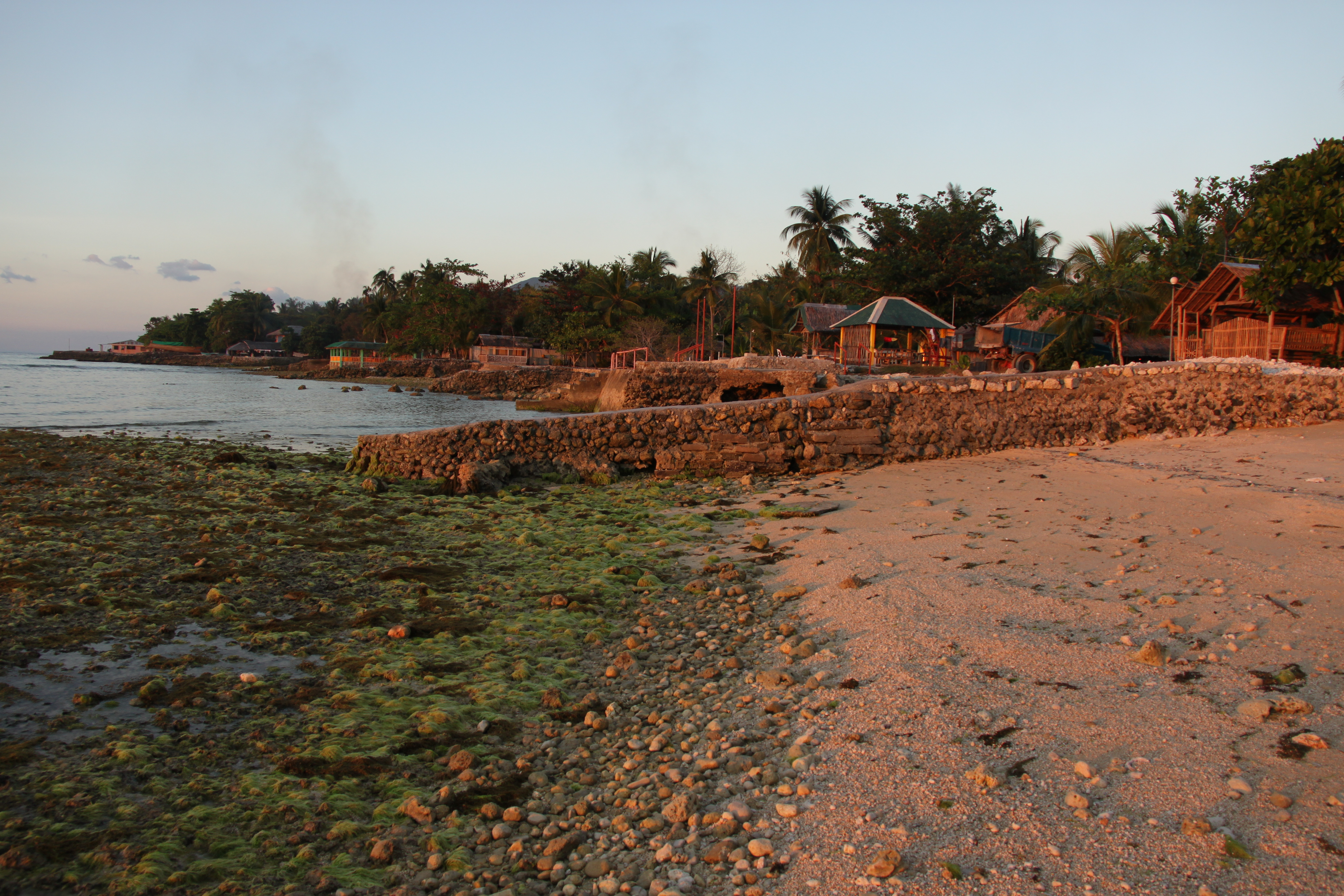 Samboan, Cebu, Philippines